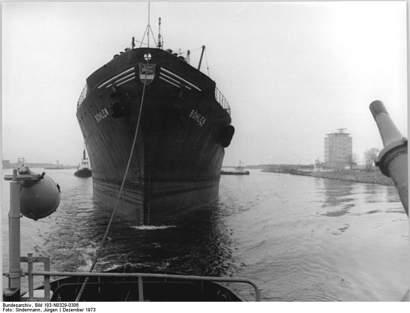 ADN-ZB Sindermann-23.12.1973 Bez. Rostock: Tanker "Böhlen" im Rostocker Ölhafen. Zu jeder Tag- und Nachtzeit versehen die Schlepperbesatzungen und Lotsen im Rostocker Überseehafen ihren Dienst. Sicher wurde der Tanker "Böhlen" in den Hafen geleitet."